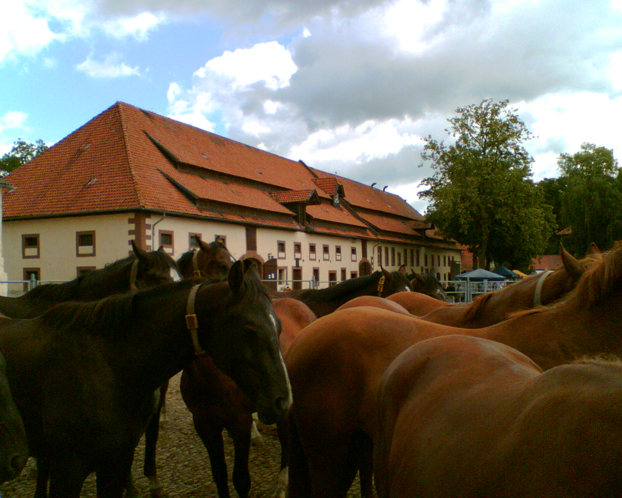 Szene im Gestüt Hunnesrück am Tag des offenen Hofes. Pferde: zweijährige Hannoveraner Hengste.